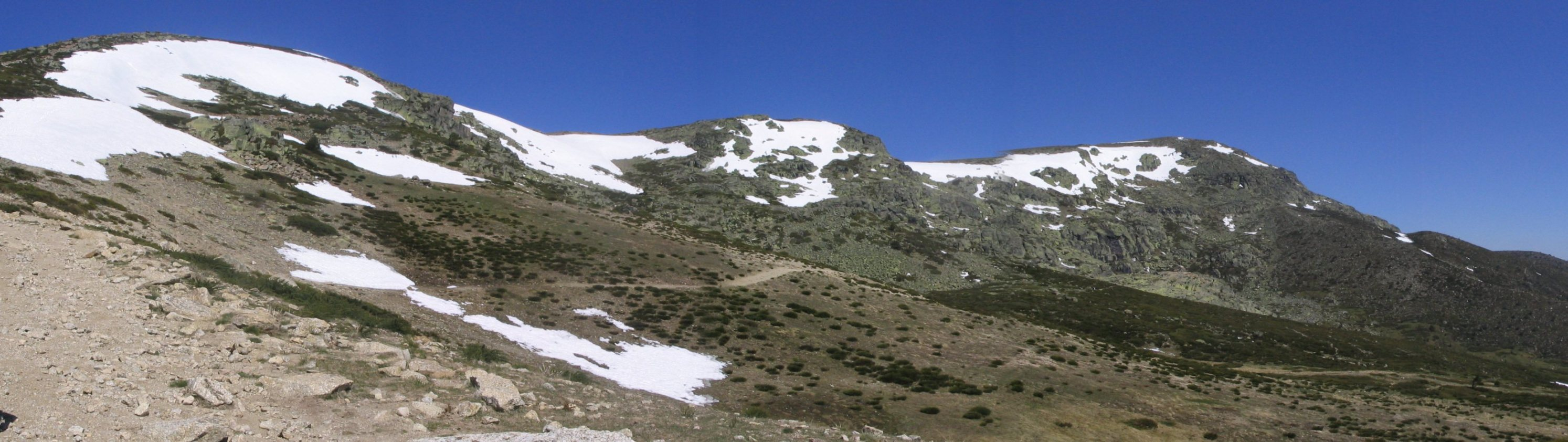 Macizo de Peñalara (2.430 m). Sierra de Guadarrama